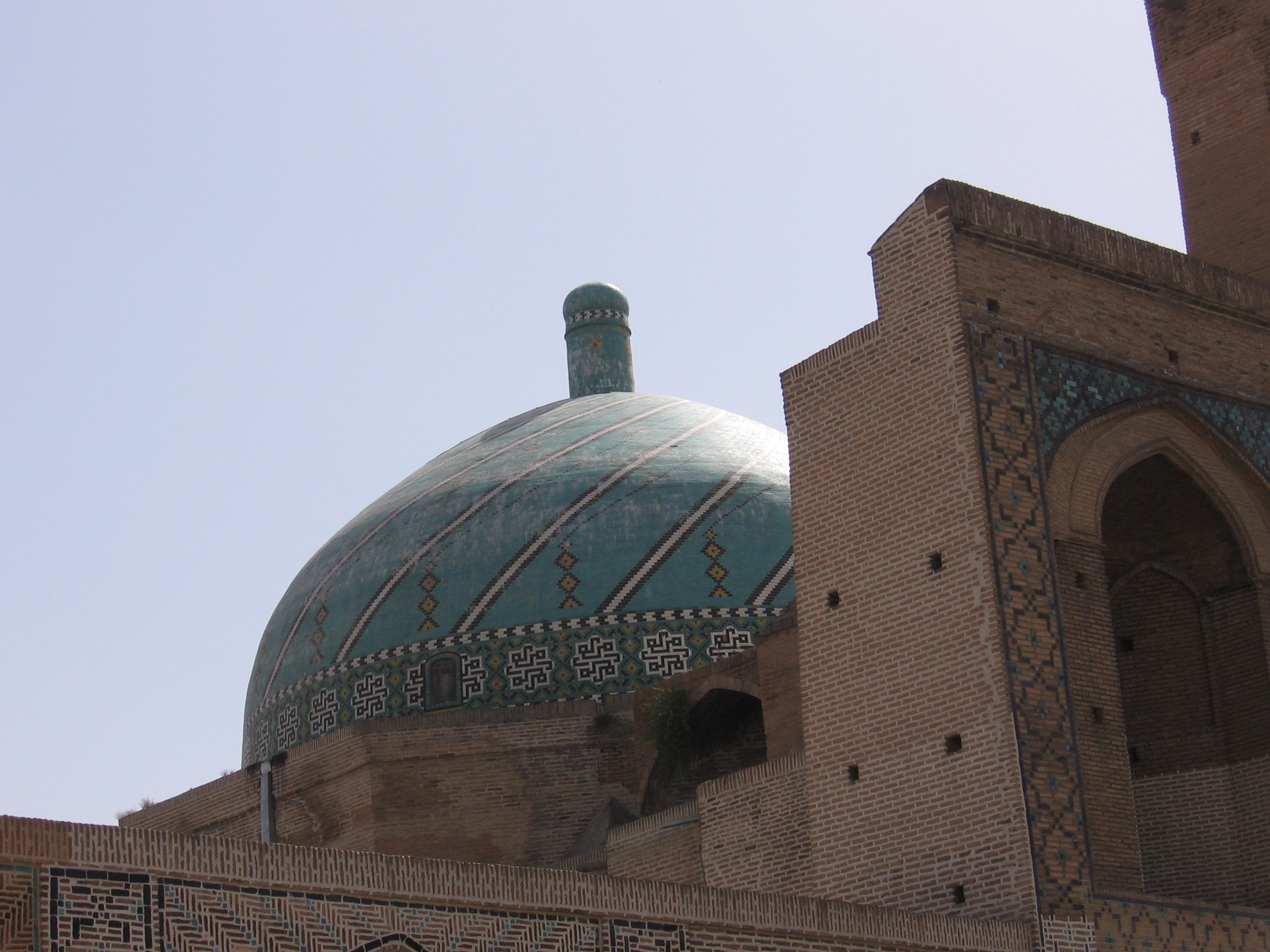 Dome, Qazvin Jaameh Mosque, Iran